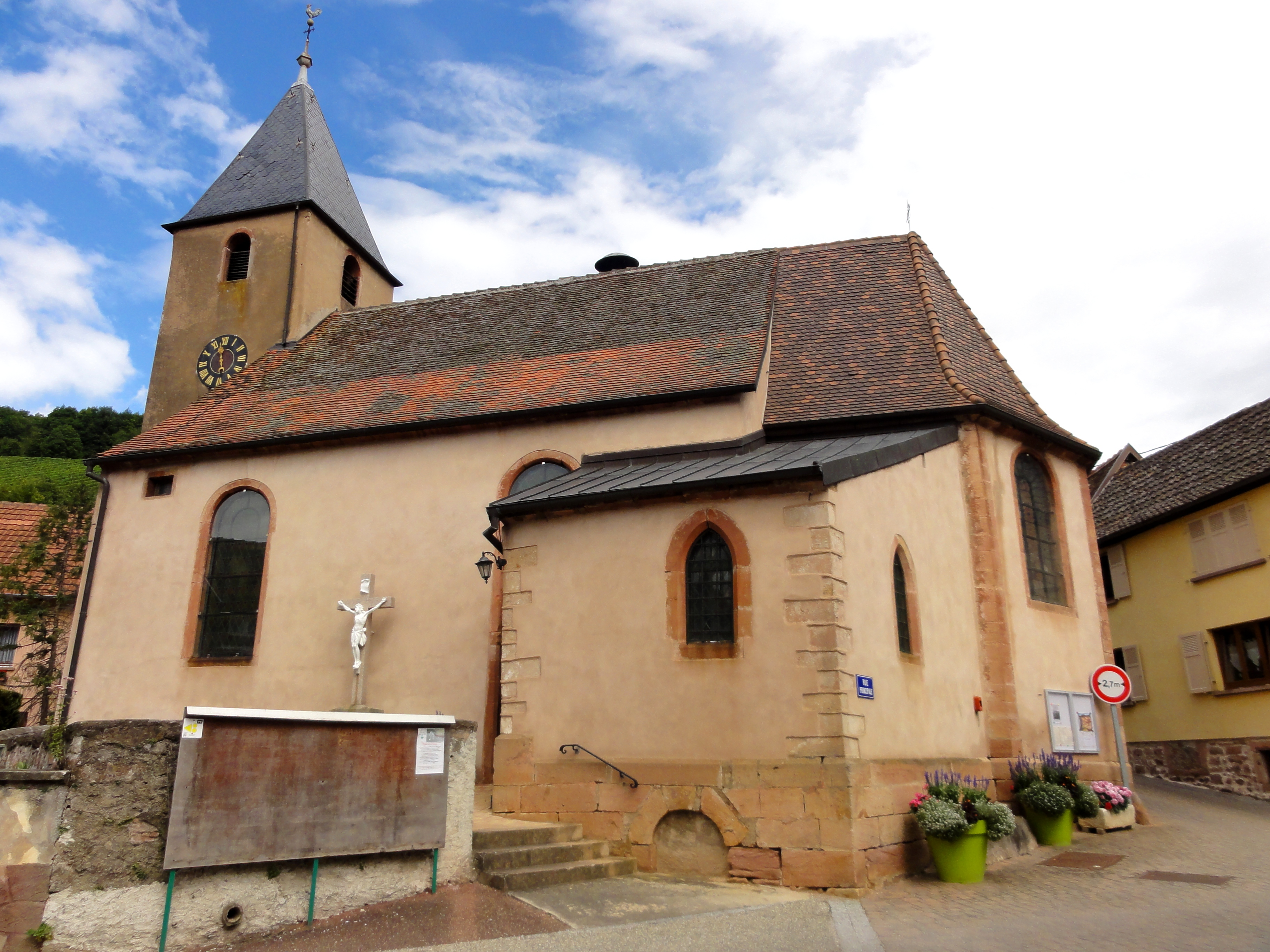 Alsace, Bas-Rhin, Bernardvillé, Église Saint-Antoine Ermite (XVe-1750), rue de l'église. .